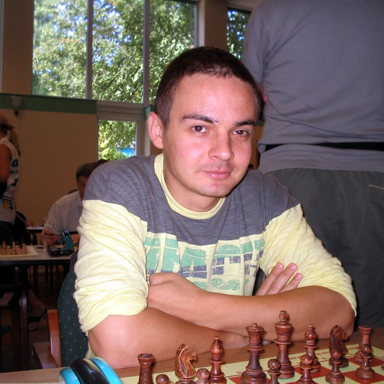 Piotr Murdzia, Kolobrzeg 2006